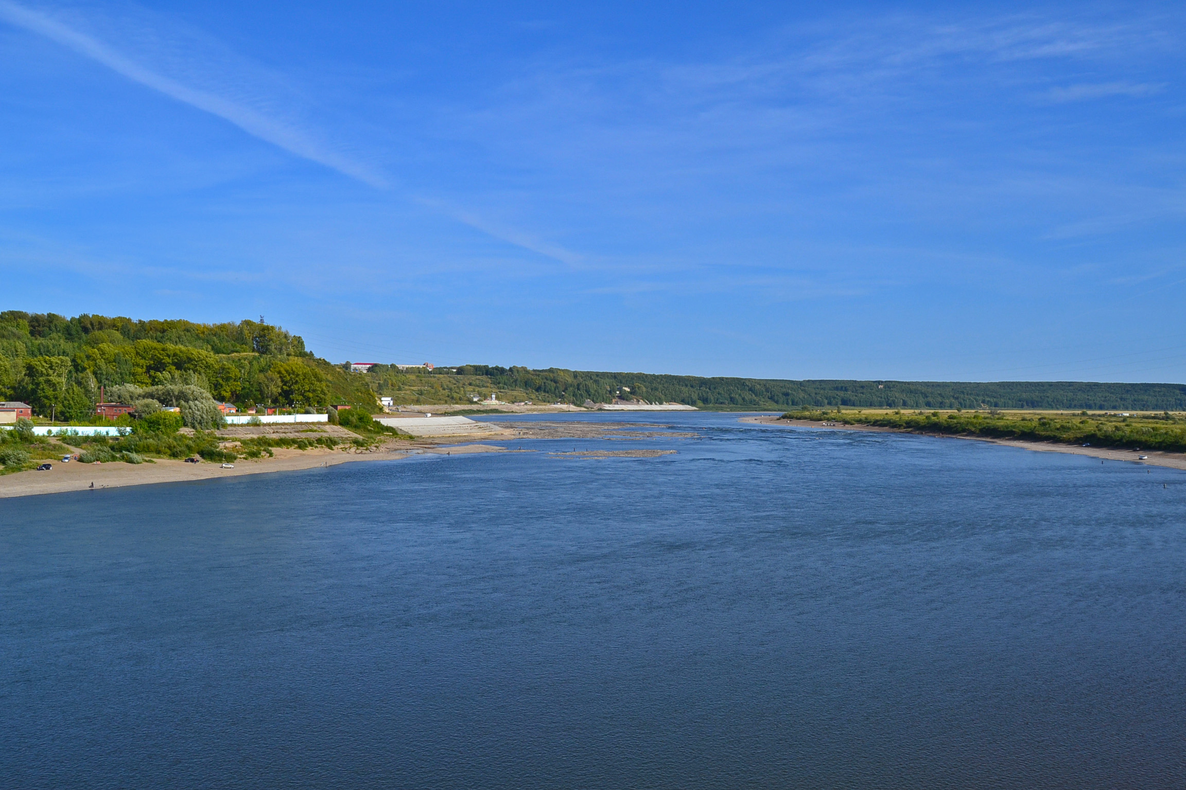 Река Томь является естественной границей Западносибирской равнины и Кузнецкого Алатау, можно четко заметить понижение рельефа левого берега (от фотографа правого).